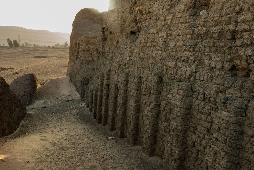 Vue sur l'enceinte de Khasekhemouy (IIe dynastie) à Abydos, en Haute-Egypte.